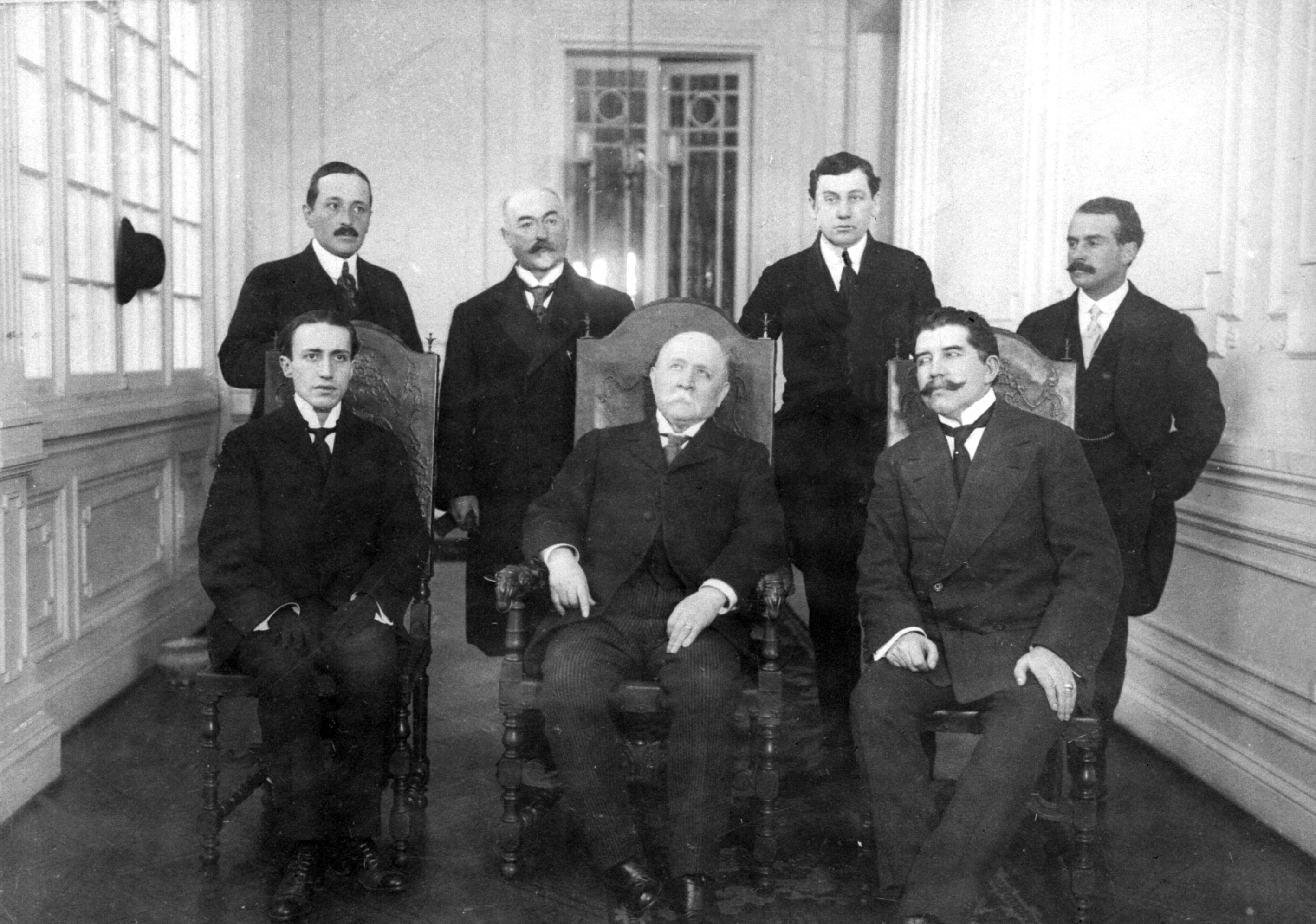 Ramón Barros Luco Presidente chileno (1910 – 1915) y gabinete ministerial